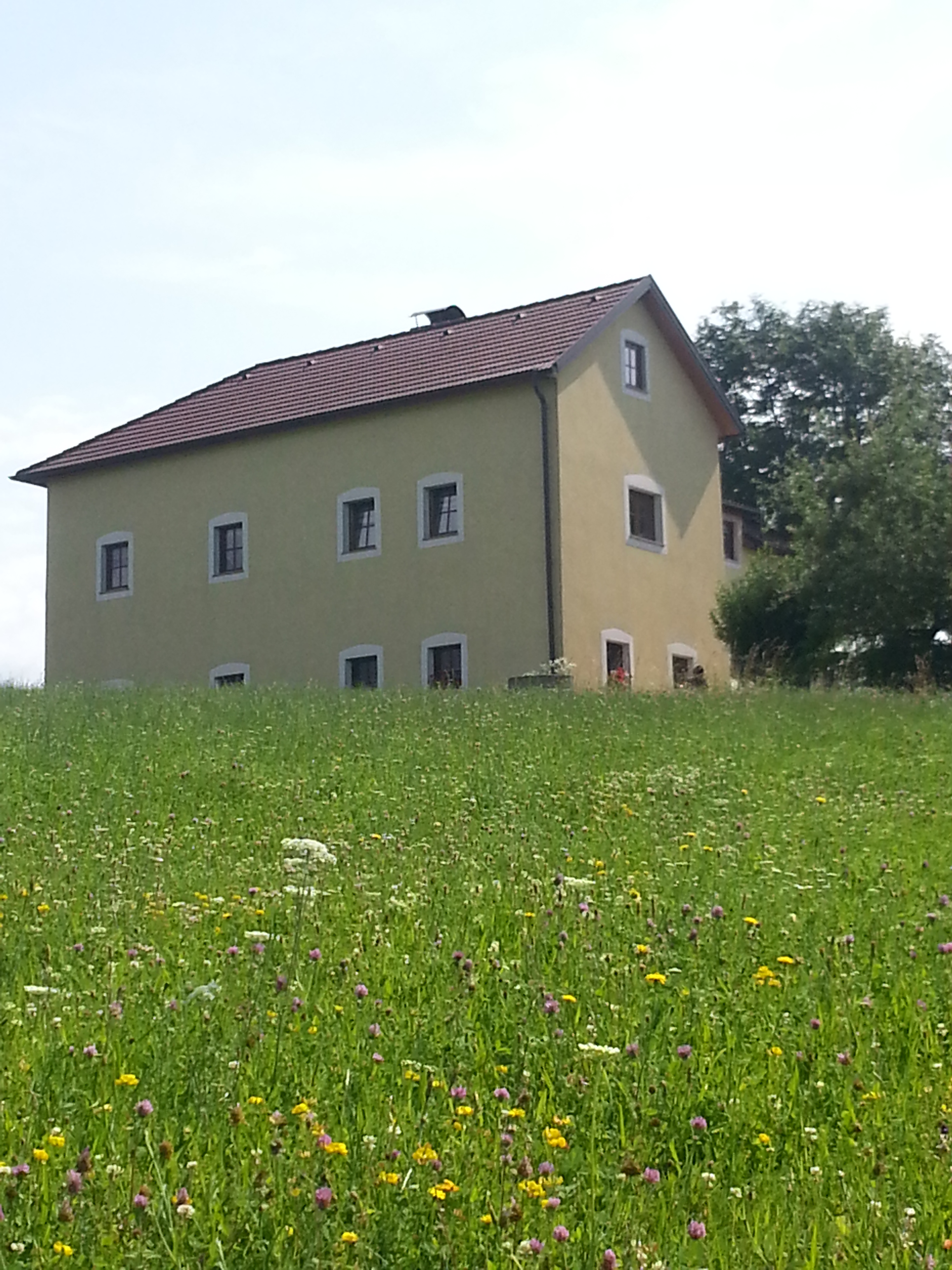 Ansicht